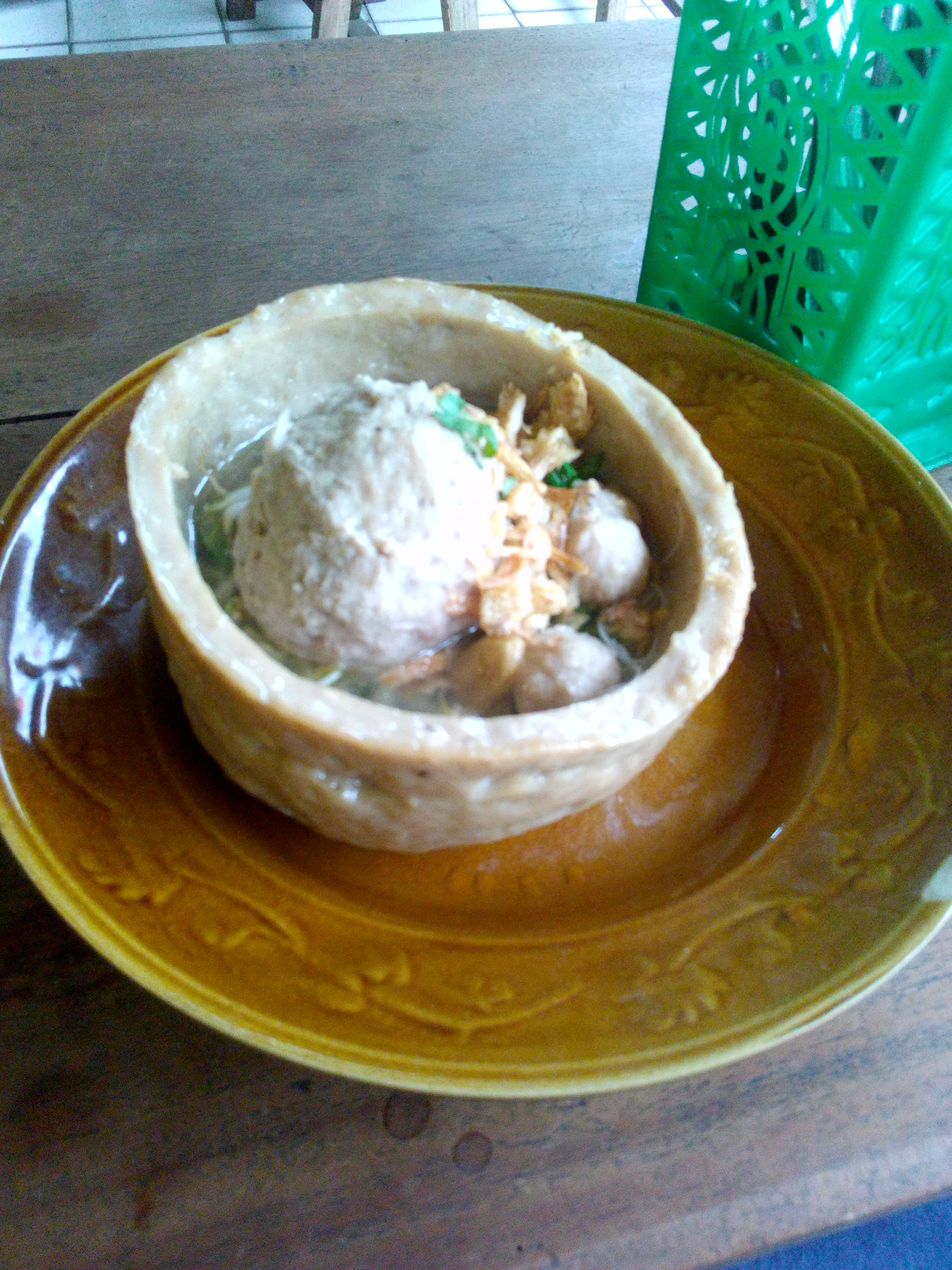 Ini adalah salah satu makanan khas Indonesia yang bernama Bakso. Rasanya yang enak membuat masyarakat menyukainya dan gemar memakannya.